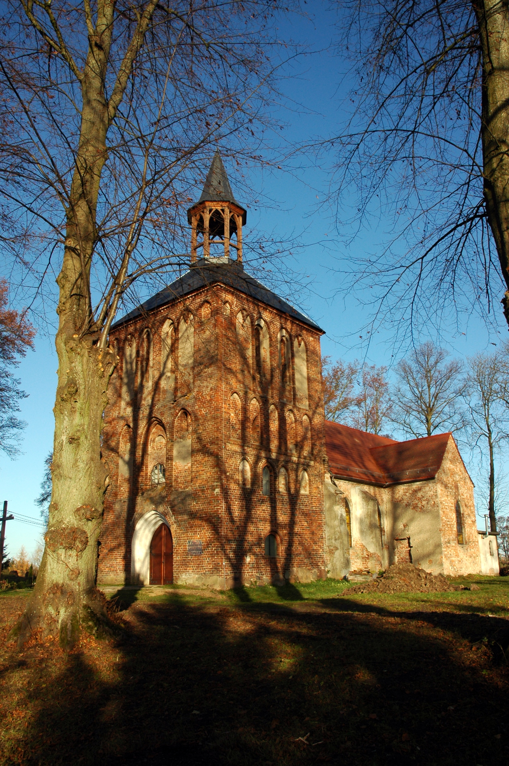 Kościół Wniebowzięcia Najświętszej Marii Panny w Czerninie (woj. zachodniopomorskie)